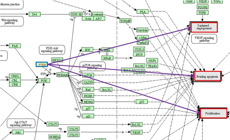 Ruta PTEN, relacionada con el cáncer.